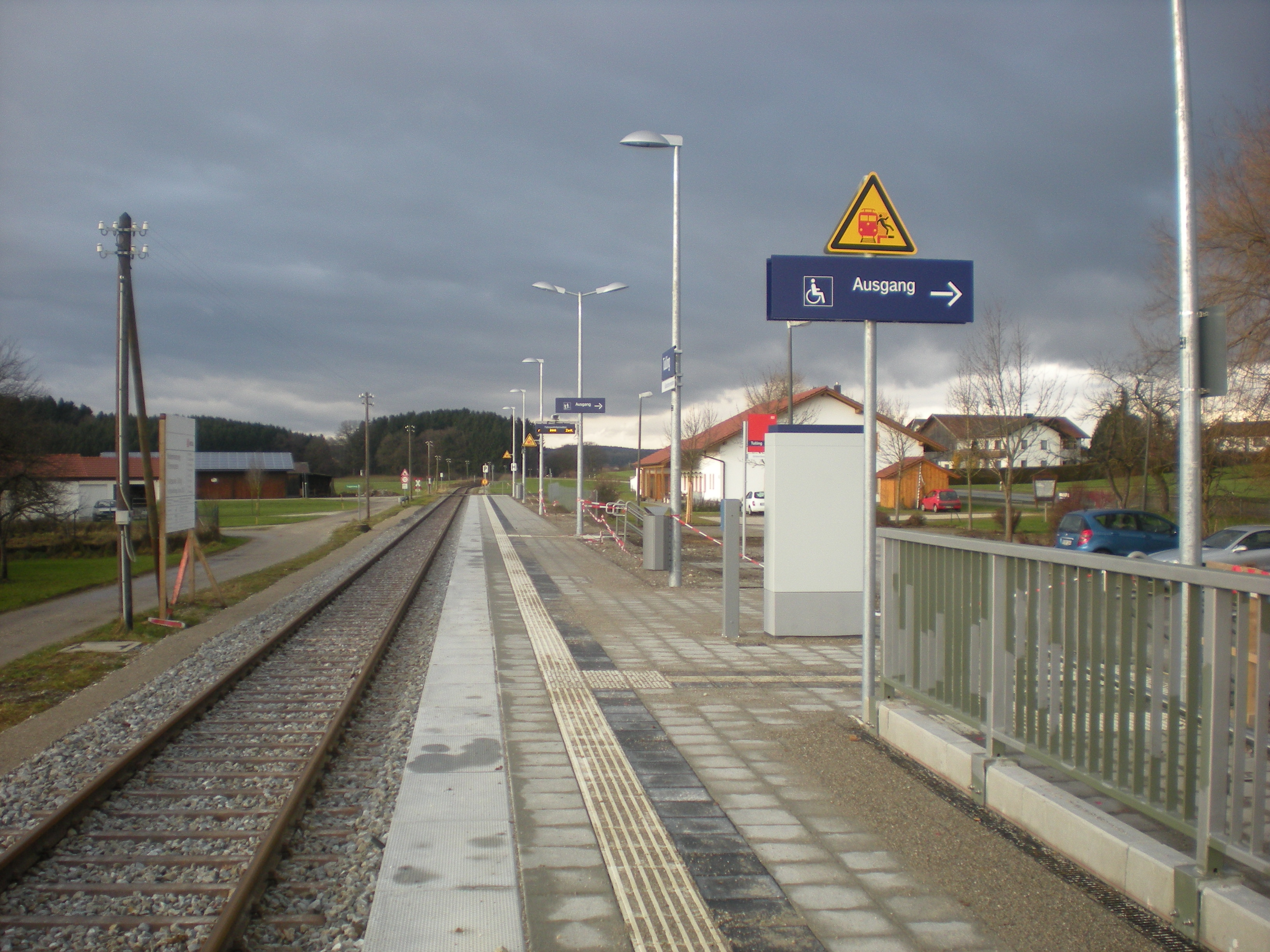 neuer Seitenbahnsteig des Haltepunkts Tulling